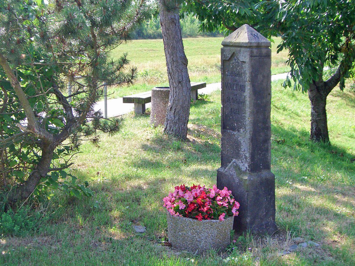 Apelstein Nr. 12 - Zur Erinnerung an die Völkerschlacht bei Leipzig Standort: Großdeuben, Zehmener Straße, am Pleißeradweg an der Brücke